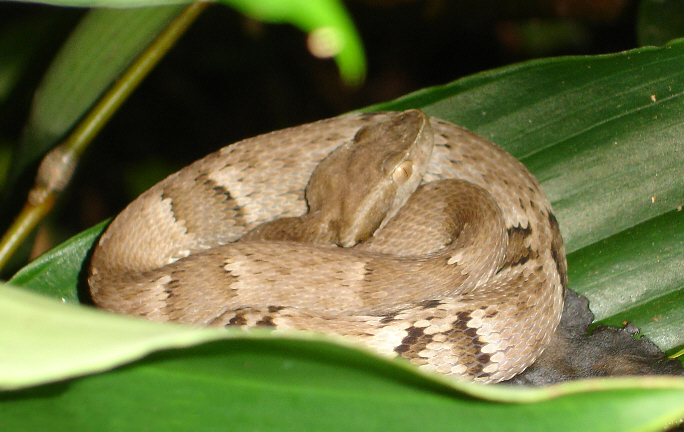 Jararaca na MAta Atlântica, Rio de Janeiro-Brasil.